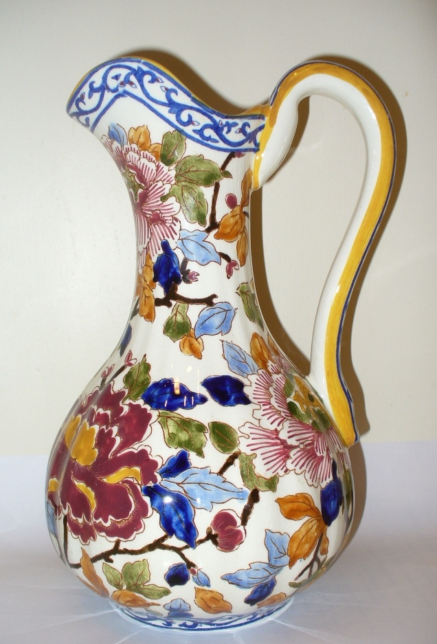 Faïence de Gien (département du Loiret, région Centre-Val de Loire).